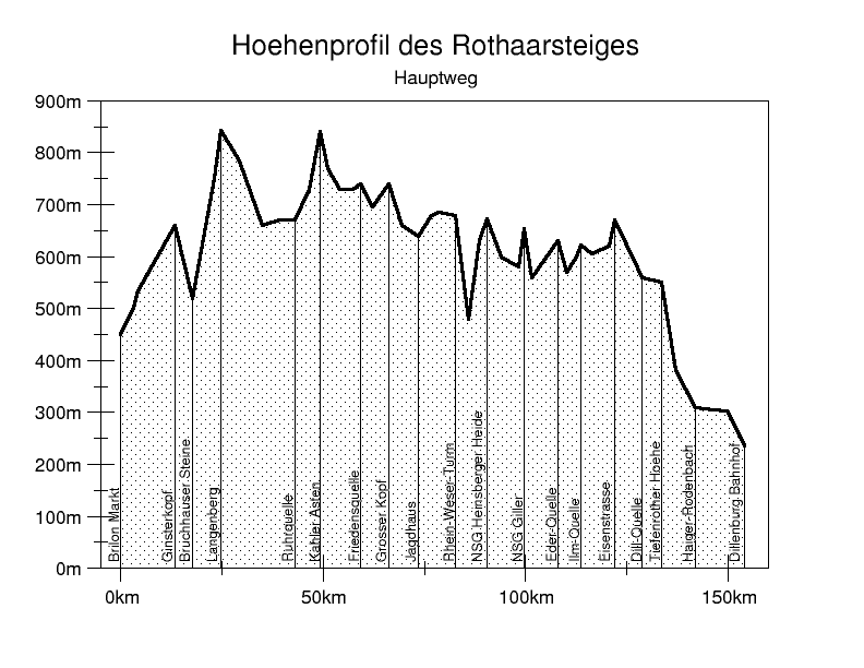 Höhenprofil des Rothaarsteiges, eigenes Diagram. Bitte auch File talk:Rothaarsteig Hoehenprofil.png beachten, da sich dort der Quellcode zum Bild befindet.